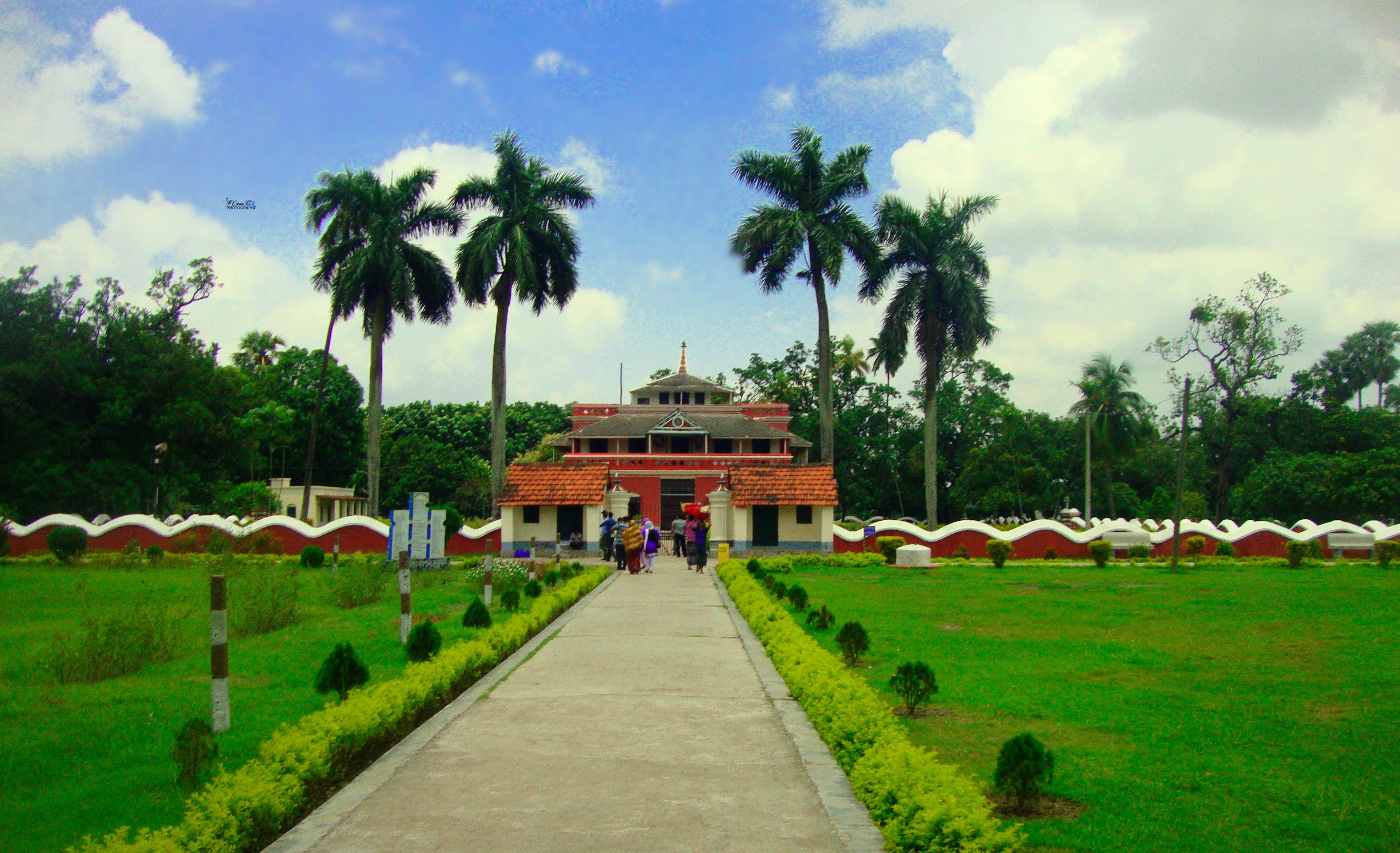 শিলাইদহ রবীন্দ্র কুঠিবাড়ি কুষ্টিয়া তে অবস্থিত এবং আমি আলিনুর ছবিটি গ্রহণ করার সৌভাগ্য অর্জন করি।